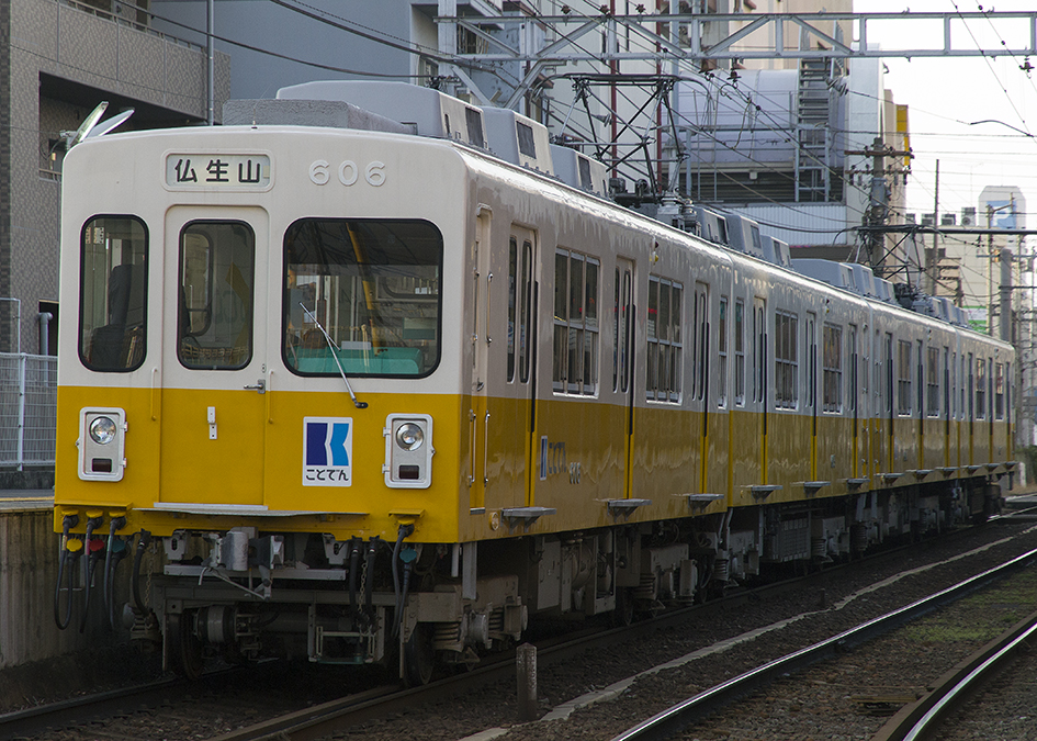 高松琴平電鉄 新琴平線色 600形 606+605+604+603